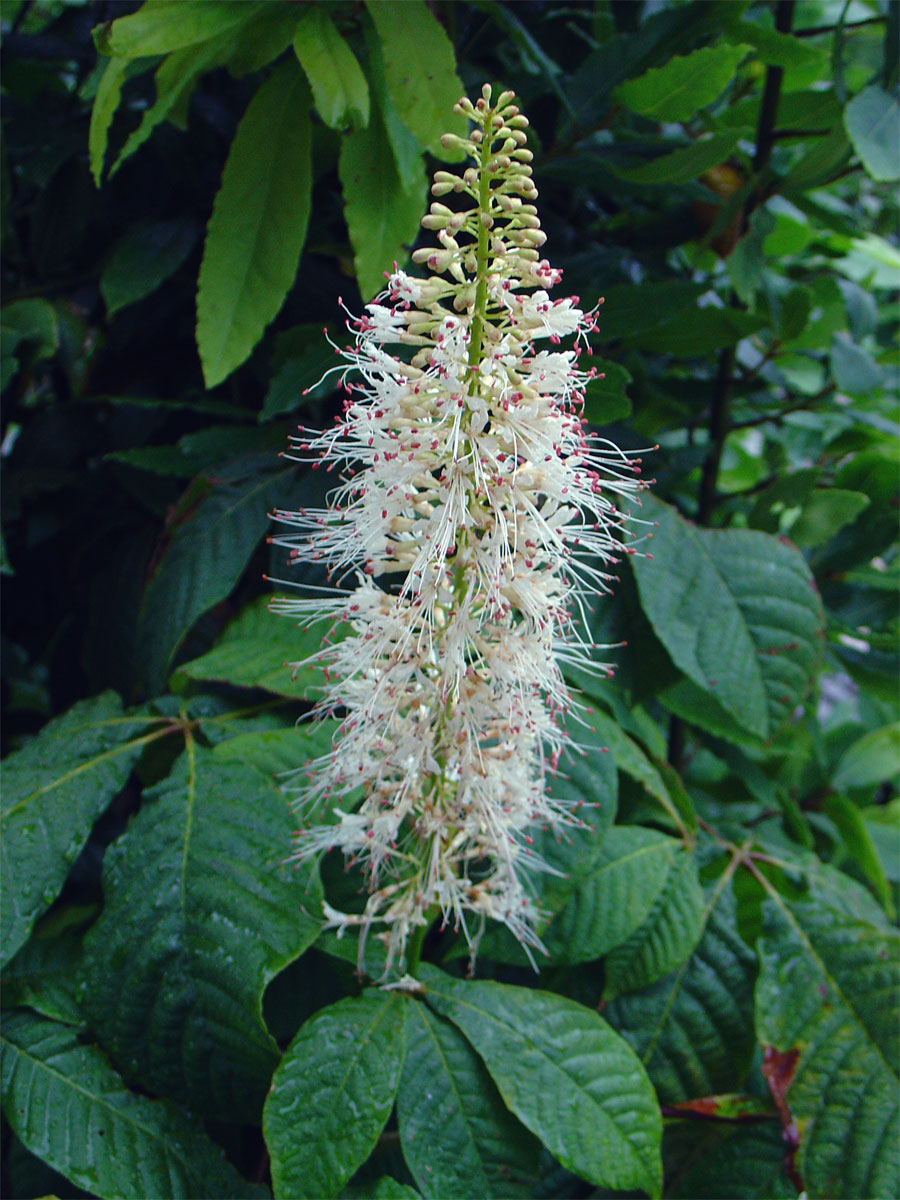 Aesculus parviflora flowers.